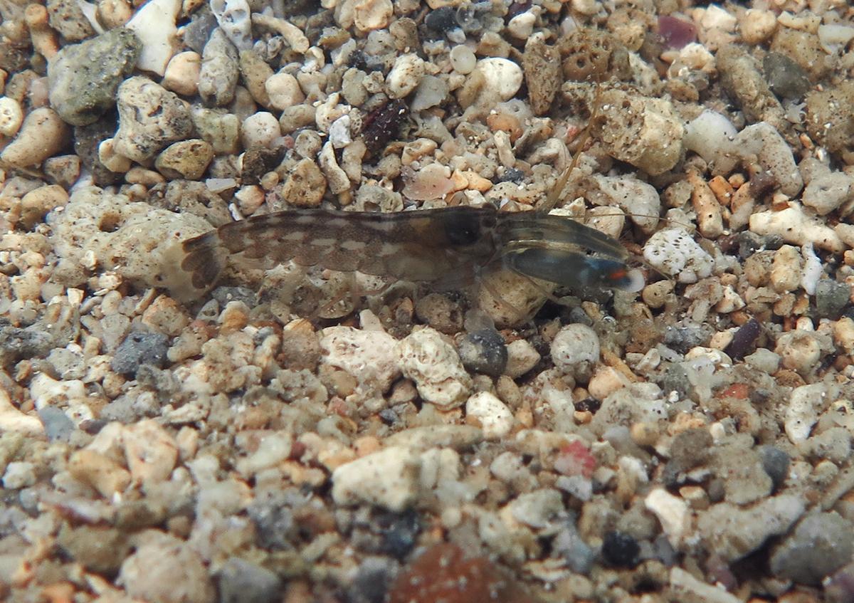 Alpheus pacificus à la Réunion.